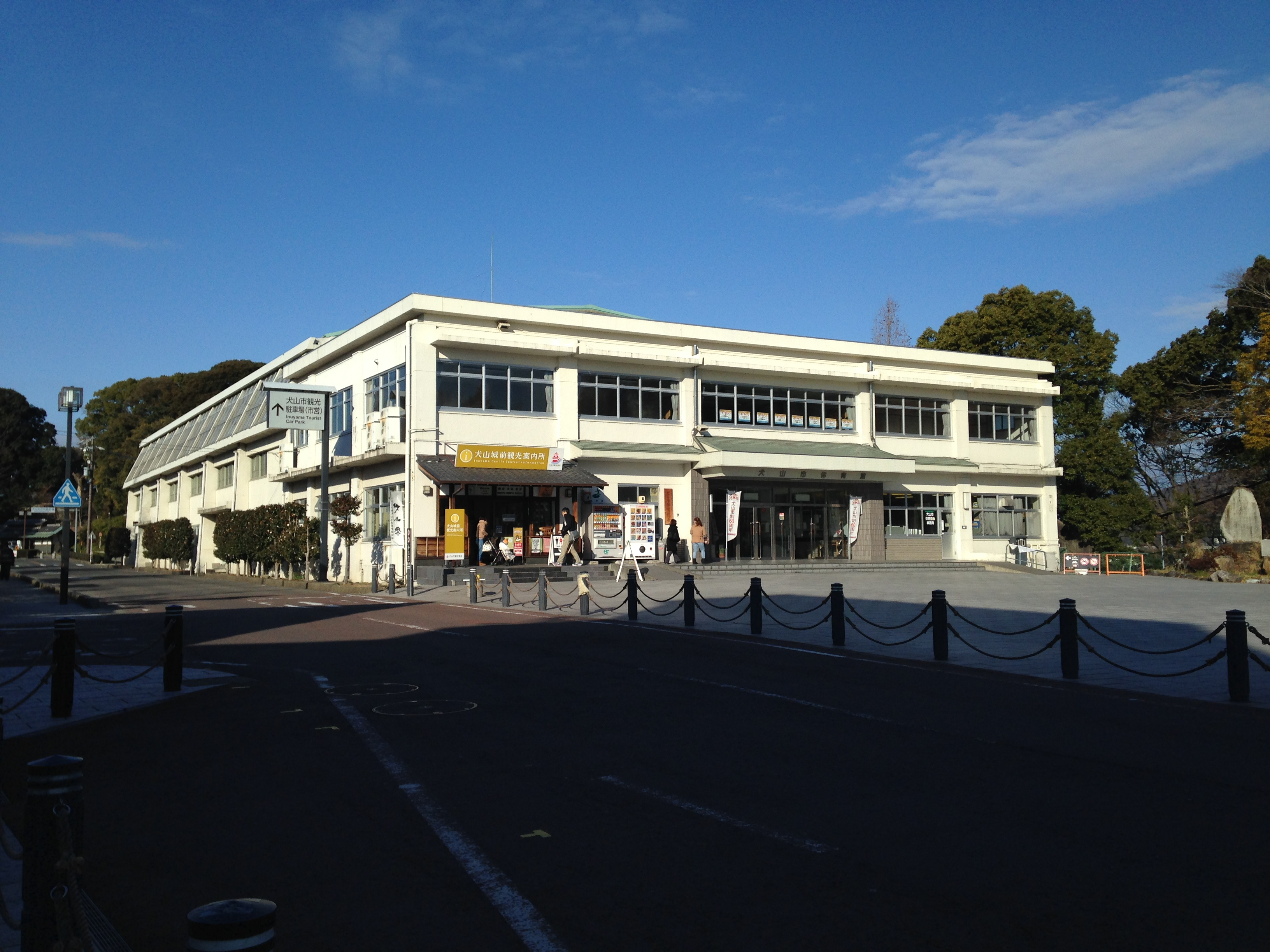 犬山市体育館